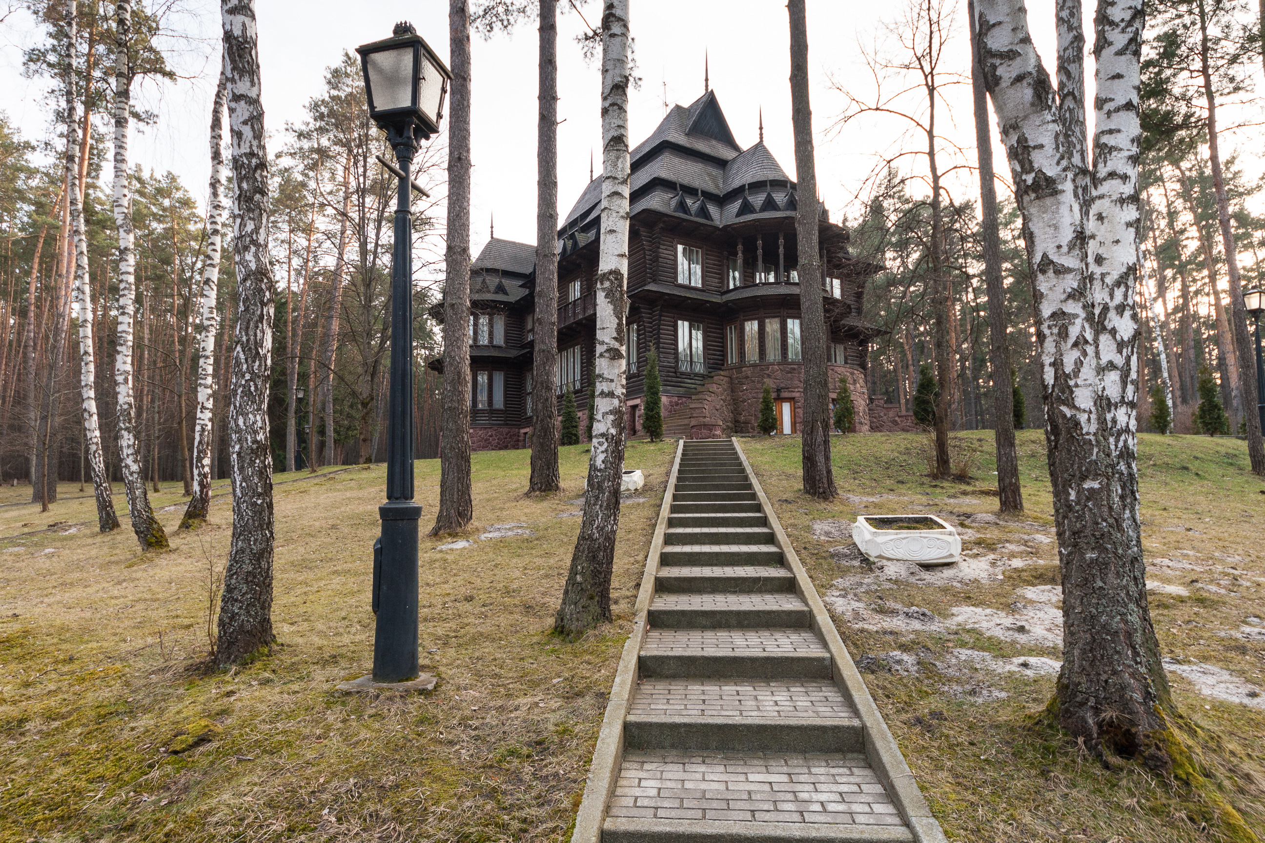 Державна резиденція «Залісся», Броварський район